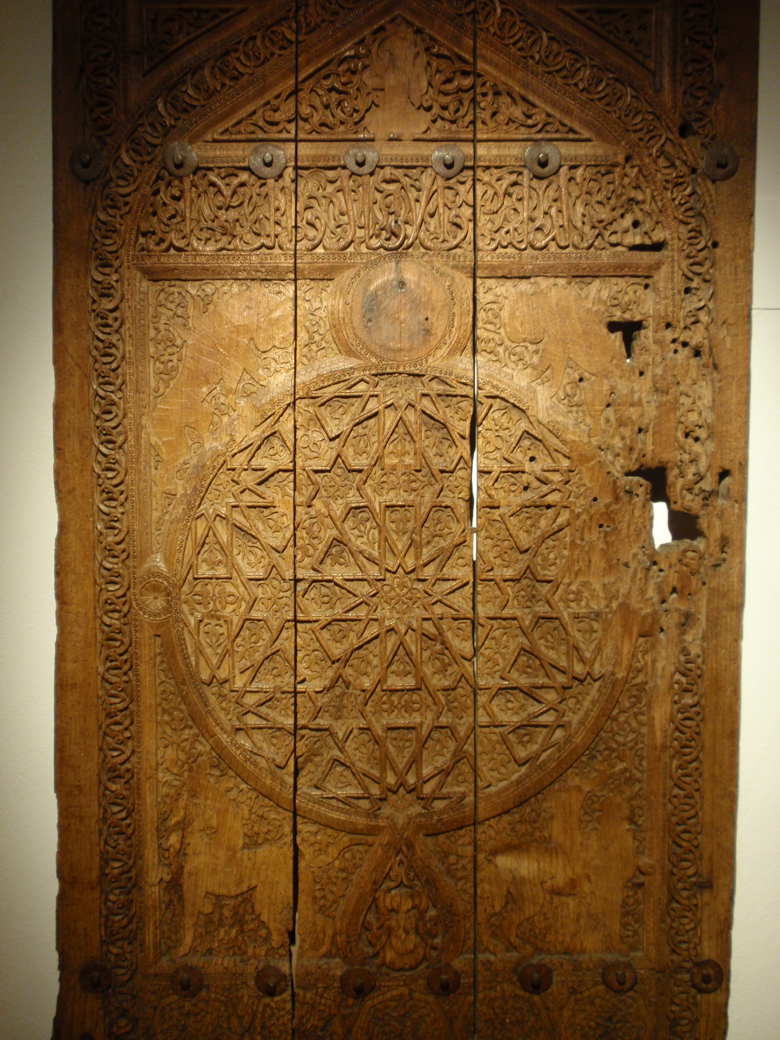 İstanbul Türk ve İslam Eserleri Müzesinden bir Ahşap pencere kanadı, Ahşap üzerini oyma tekniği, Konya Karaman İbrahim bey imaretinden getirilmiştir. 12-13. yüzyıl